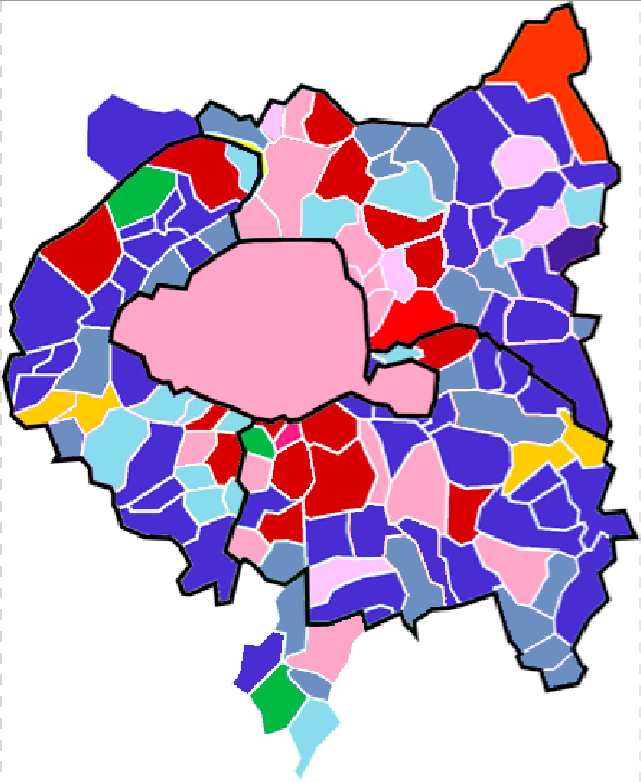 Carte des couleurs politiques des 131 maires des communes du Grand Paris en juillet 2020